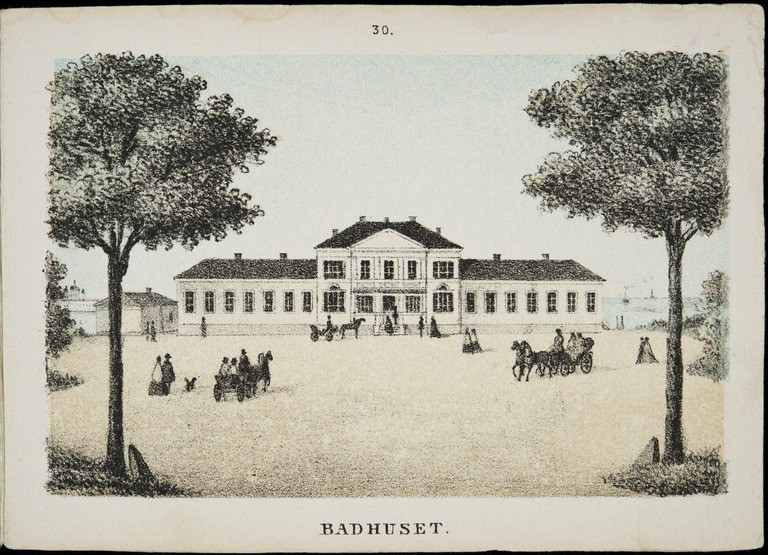 Näkymä Kaivopuiston kylpylälle. Kylpylän päärakennus taka-alalla keskellä. Etualalla laaja hiekkakenttä, jolla hevosvaunuja ja jalankulkijoita. Näkymää kehystää etualalla reunoilla vehreät pensasmaiset puut. Taustalla näkyy pilkahdus merta.